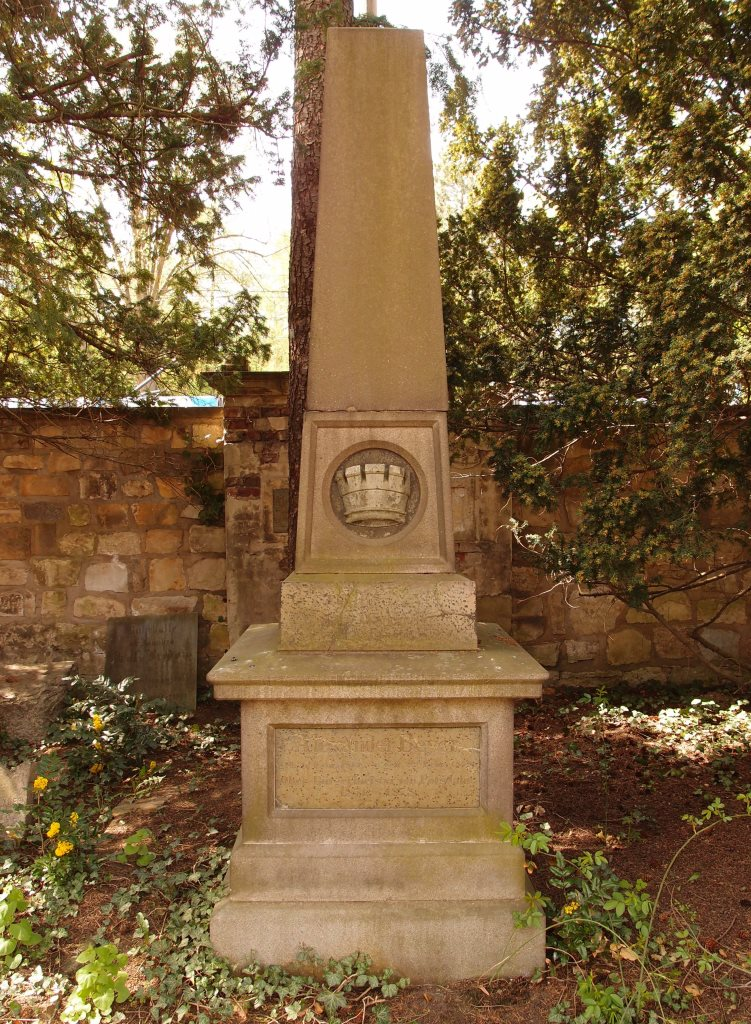 Grab des Oberbürgermeisters von Potsdam und Mitglieds des preußischen Herrenhauses, Alexander Beyer (1813-1878) auf dem Alten Friedhof in Potsdam